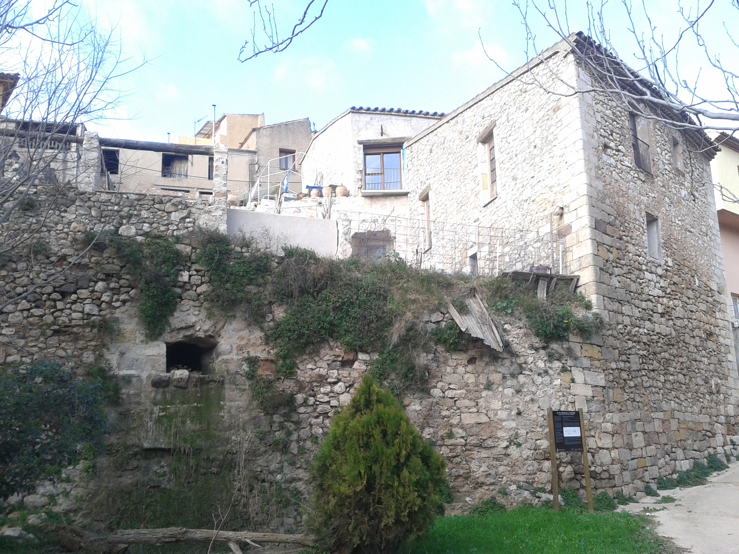 Molí del Janoi o de Baix, al Carrer de la Vila n. 53 de Vilaverd